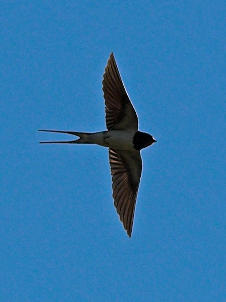 Rauchschwalbe im Flug